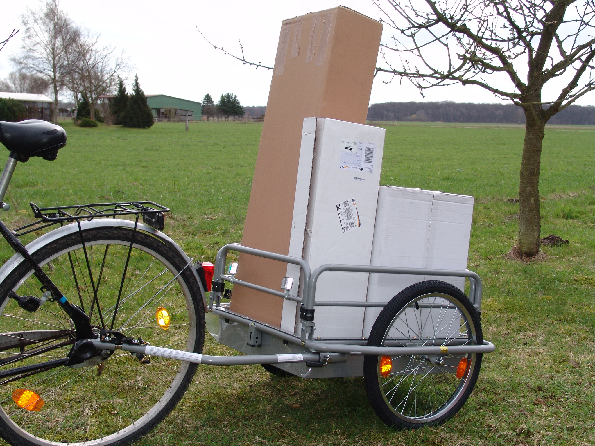 грузовой велоприцеп